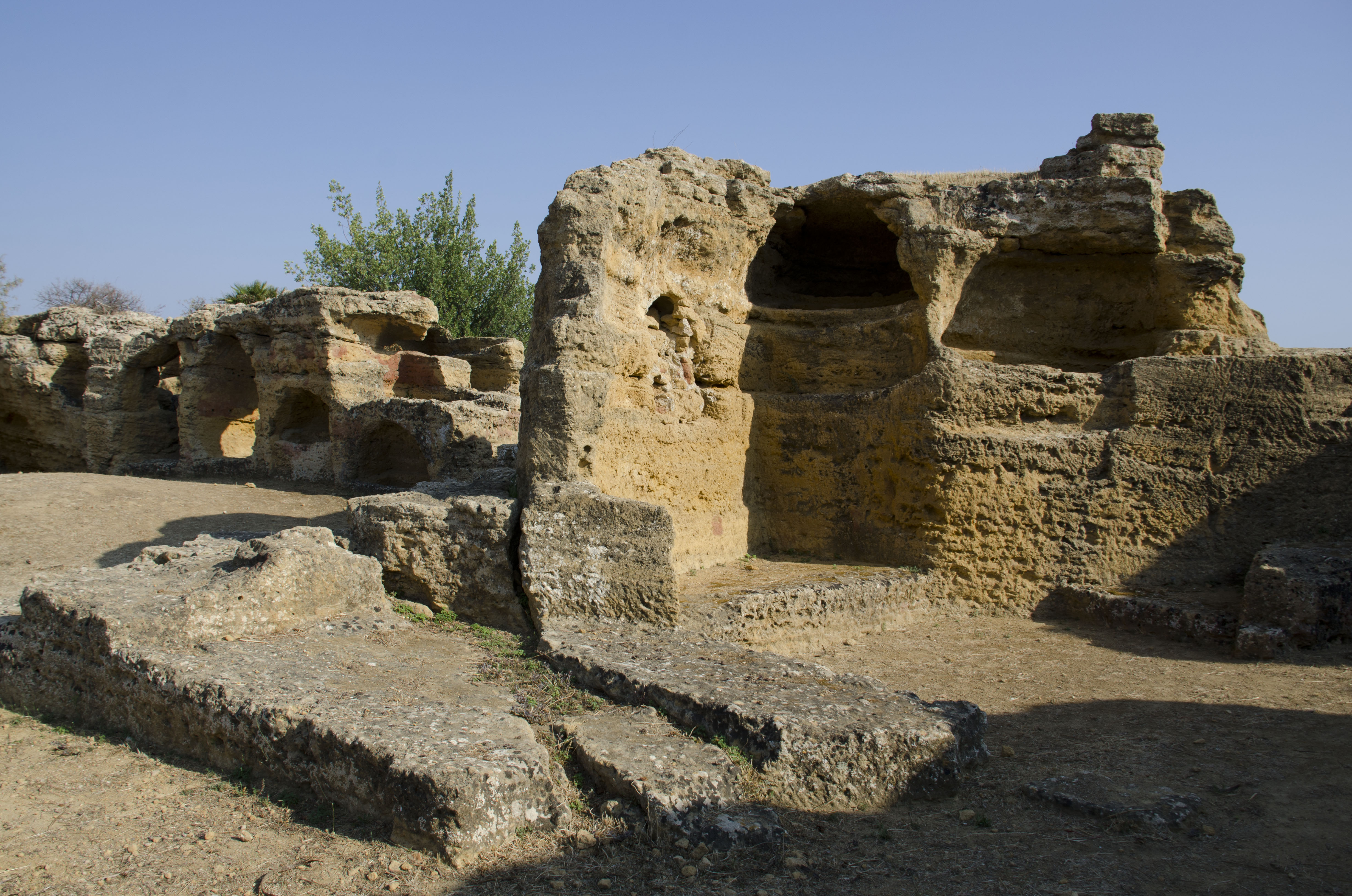 Tal der Tempel bei Agrigento, Sizilien. Stadtmauer mit Arkosolgräbern.